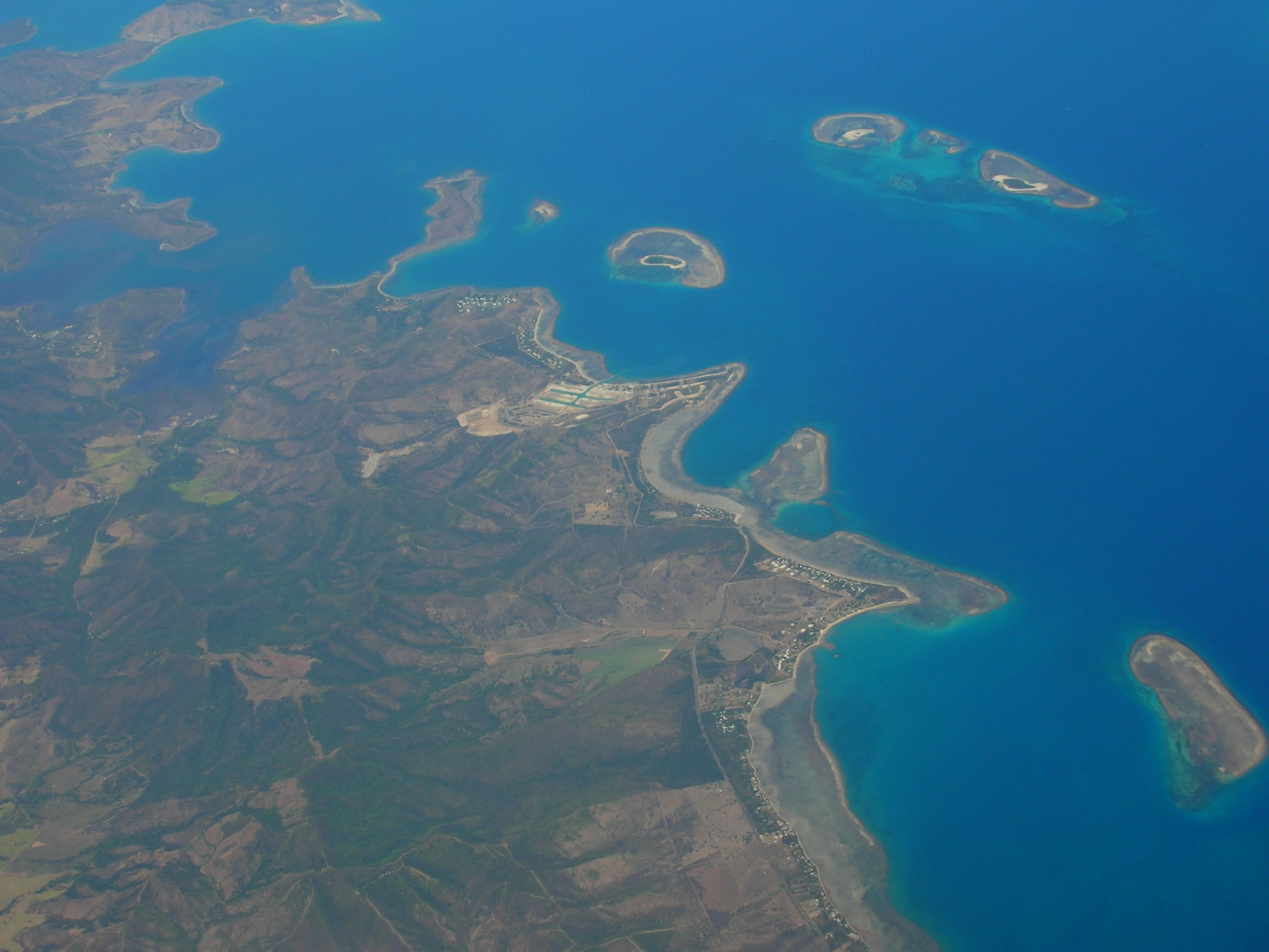 i090806 038